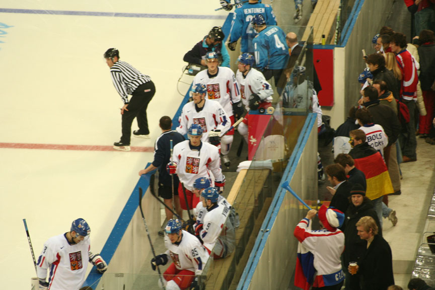 Equipe de hockey sur glace de la République tchèque aux Jeux olympiques de 2006